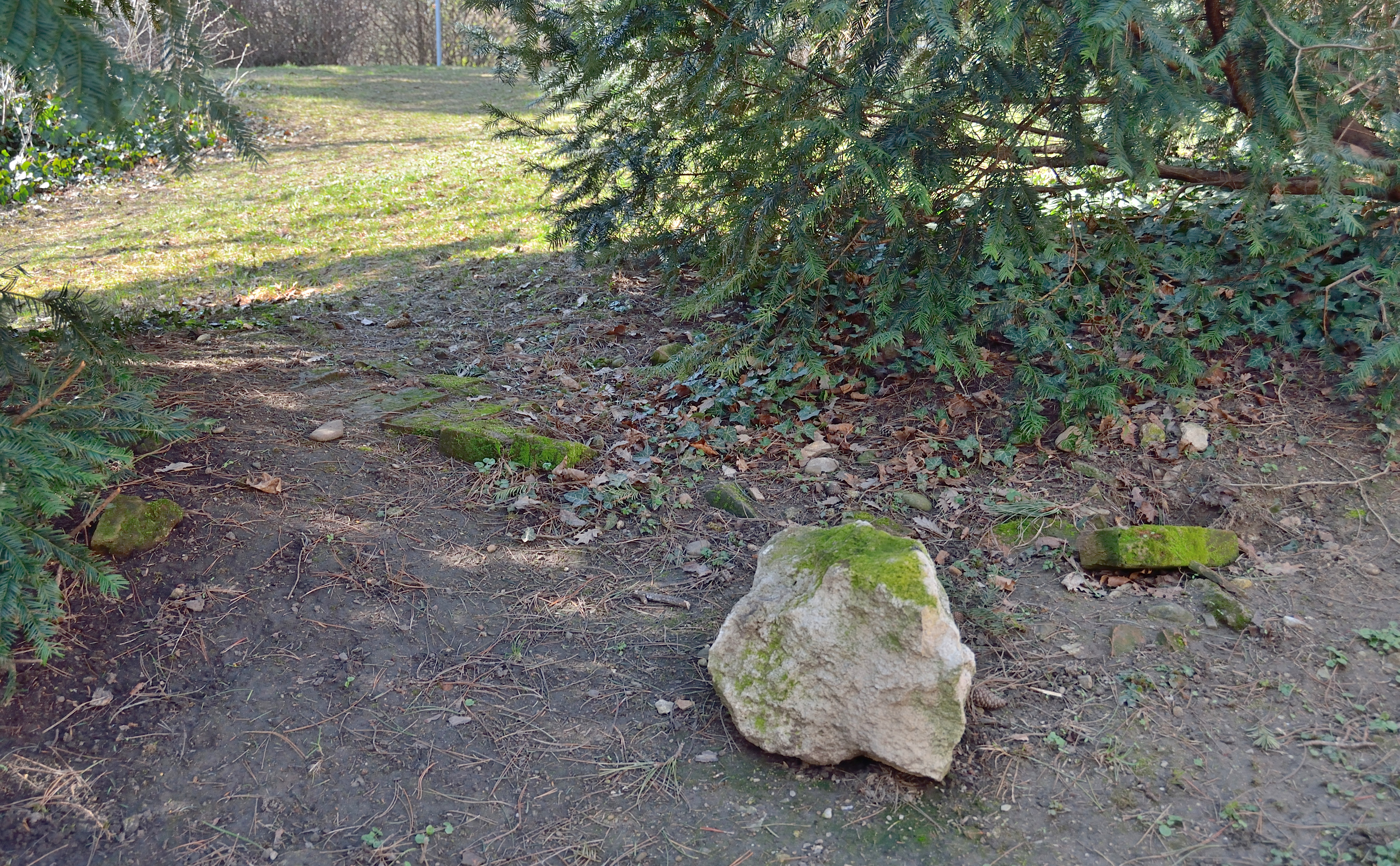 Im Maxingpark sind noch Fundamente der 1955 abgerissenen Maxingvilla zu sehen.